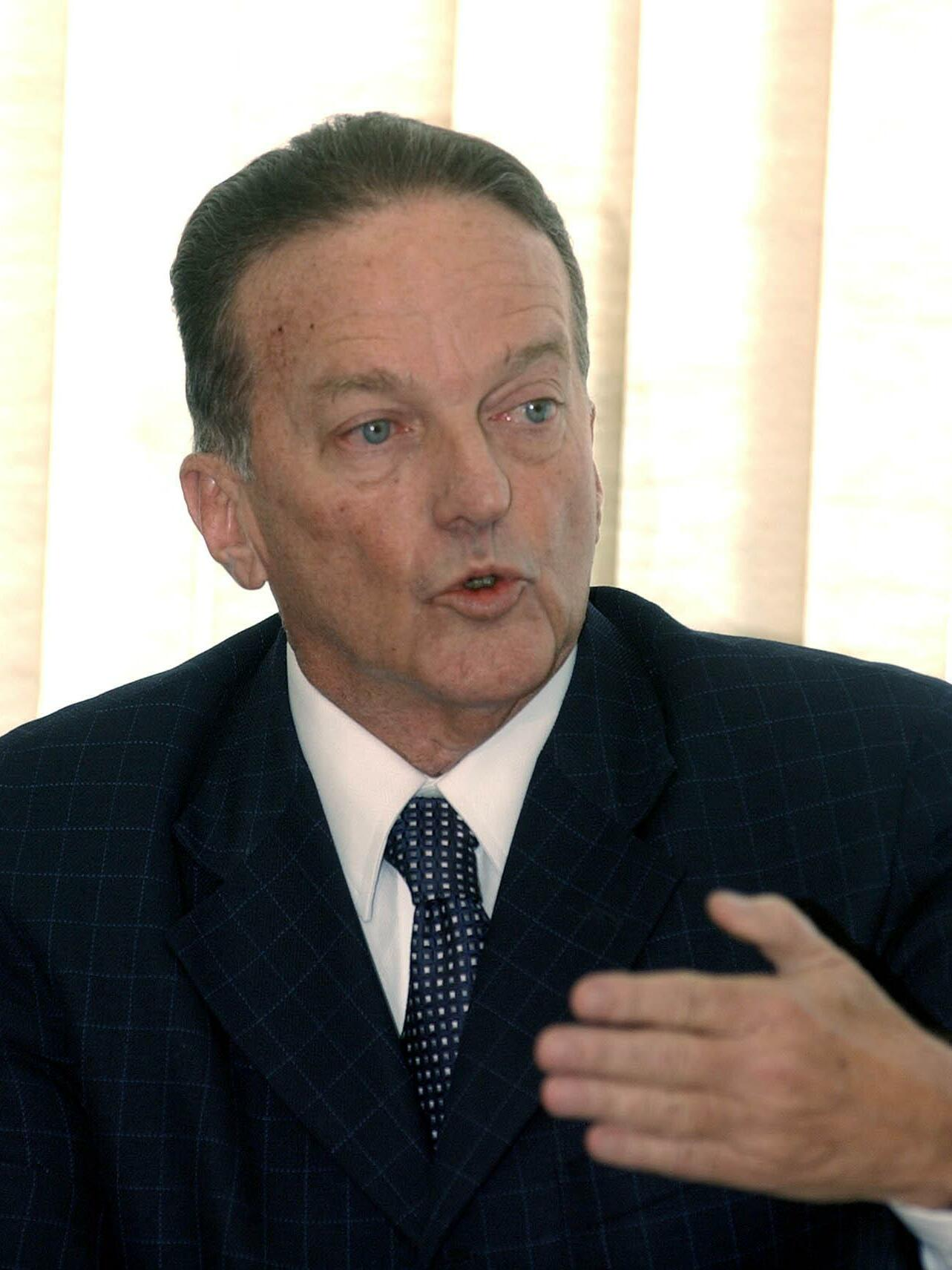 O político brasileiro Jorge Bornhausen.